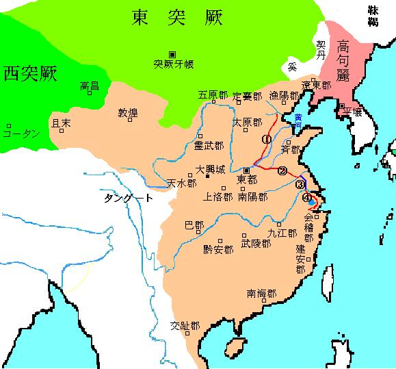 隋帝国〔煬帝〕、①～④は大運河。青は文帝が建設した大運河、赤は煬帝が建設した大運河。①=永済渠、②=通済渠、③=山陽渠、④=江南河。